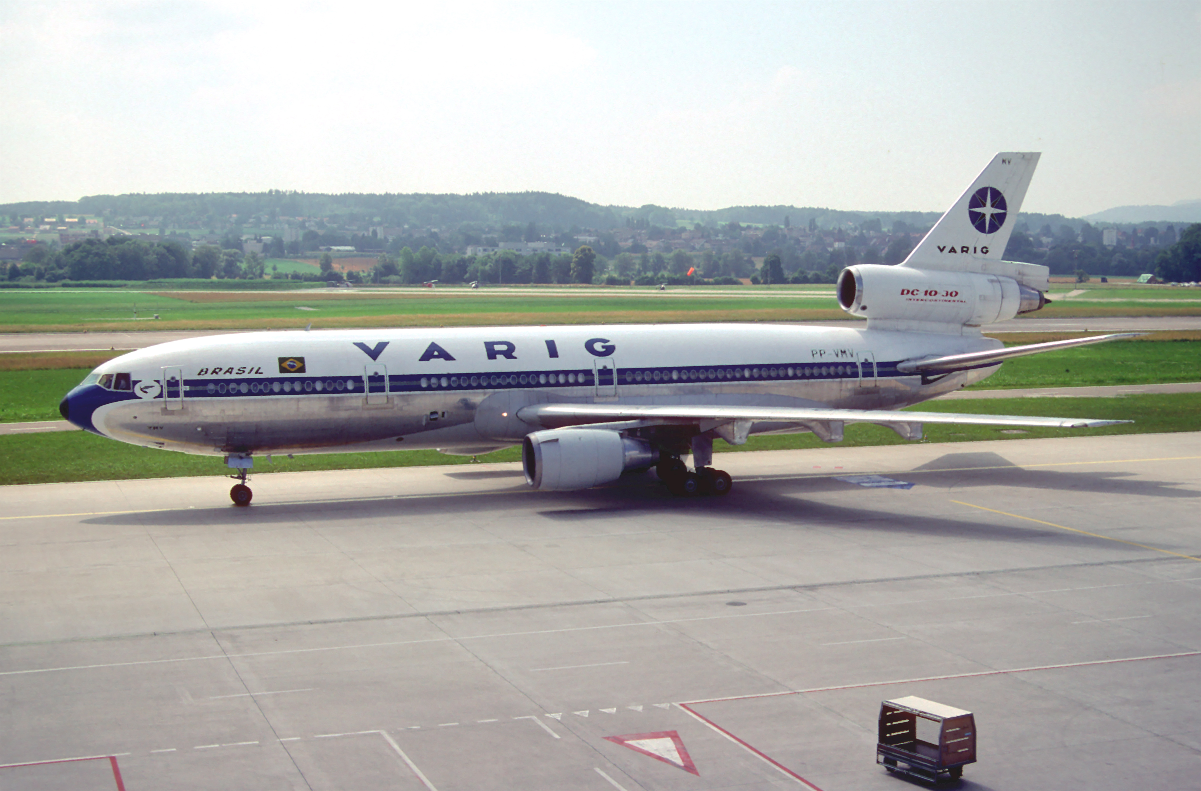 27al - VARIG DC-10-30; PP-VMV@ZRH;04.07.1998